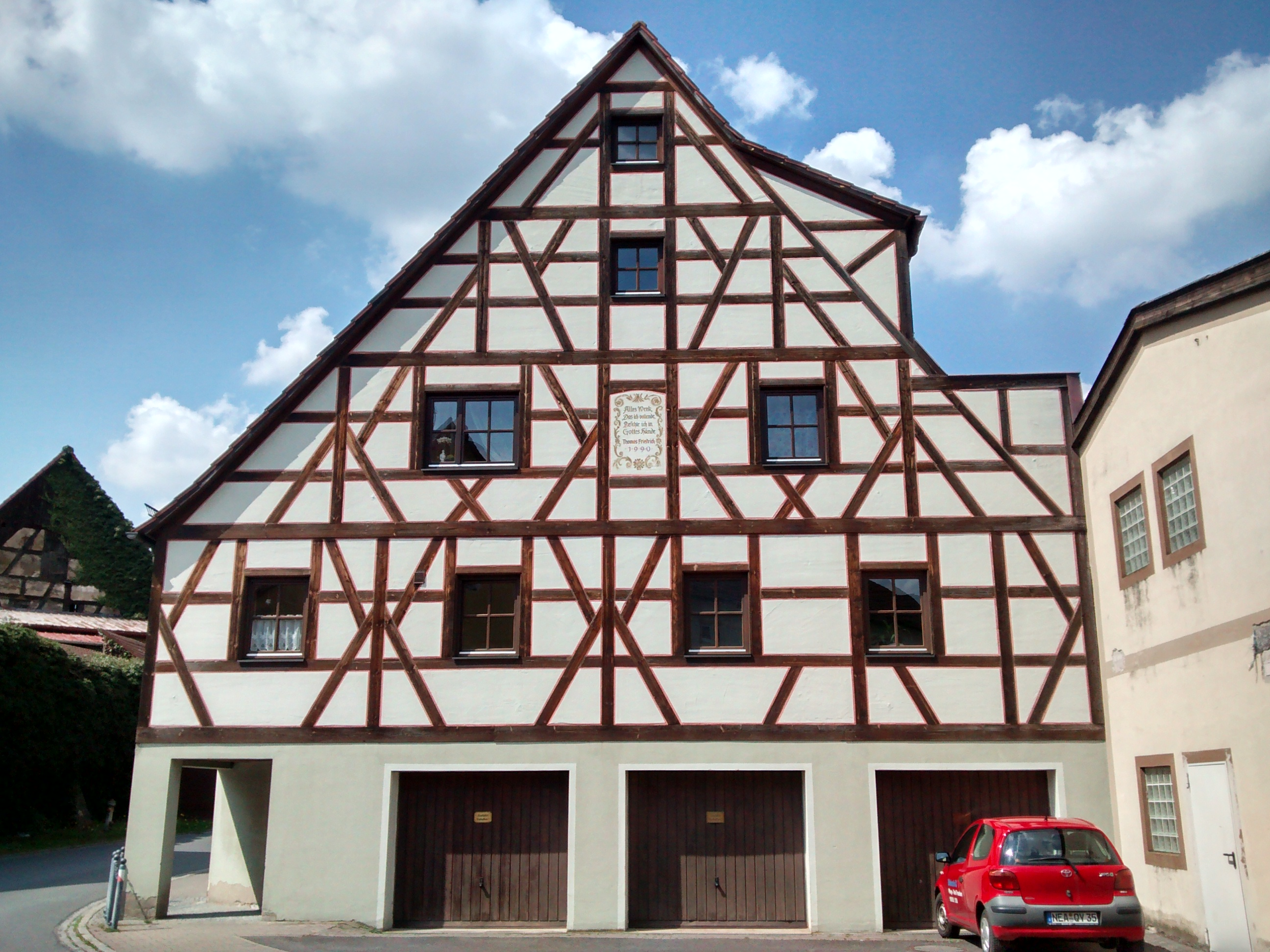 Wilhelmsdorf-von-Buirette-Str.-2